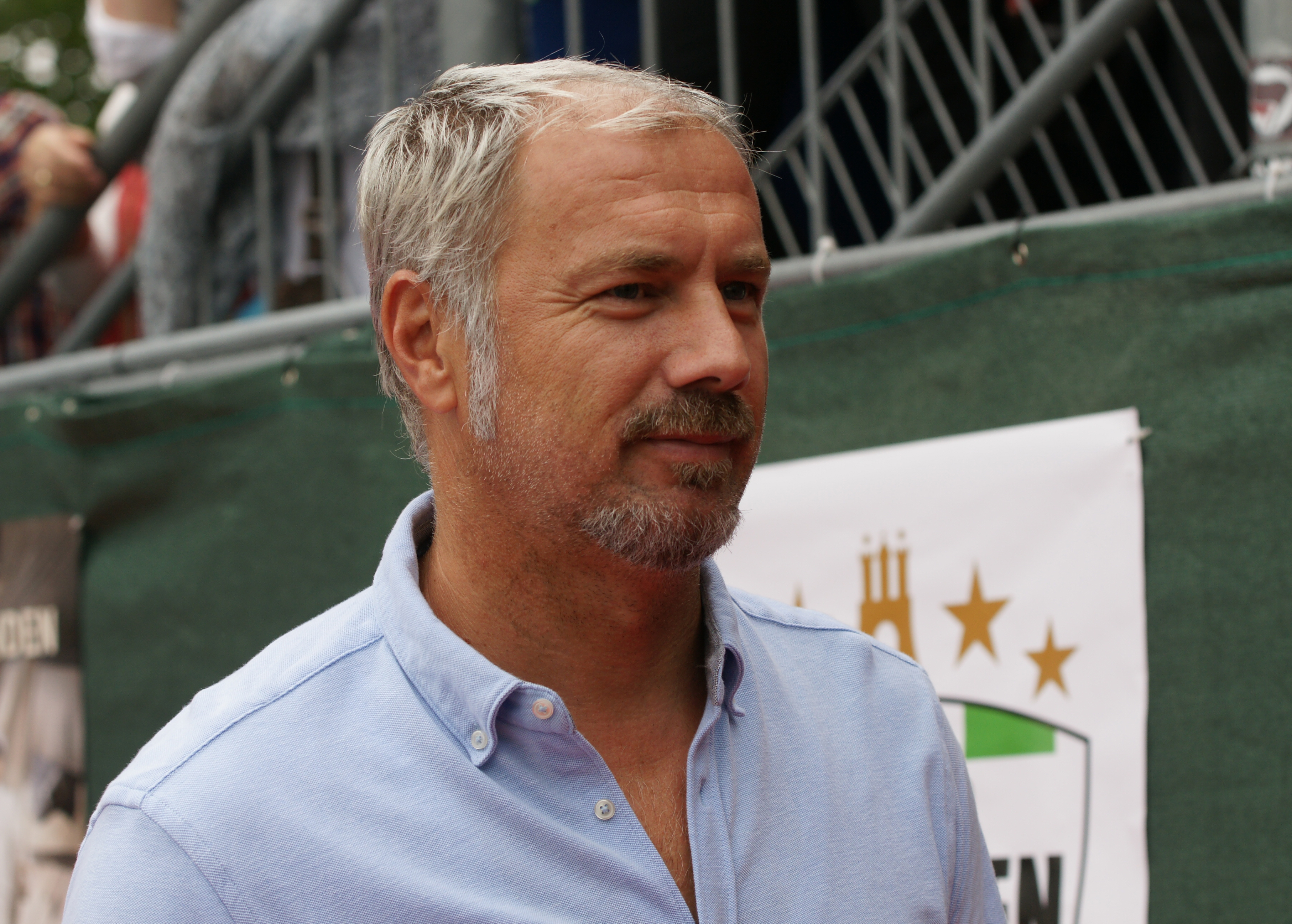 Tag der Legenden 2014 - Die Kapitäne entern Hamburg Fußballfest am Millerntor zugunsten NestWerk eV